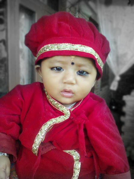 नेपाली: अन्नप्राशन गरेको बच्चा